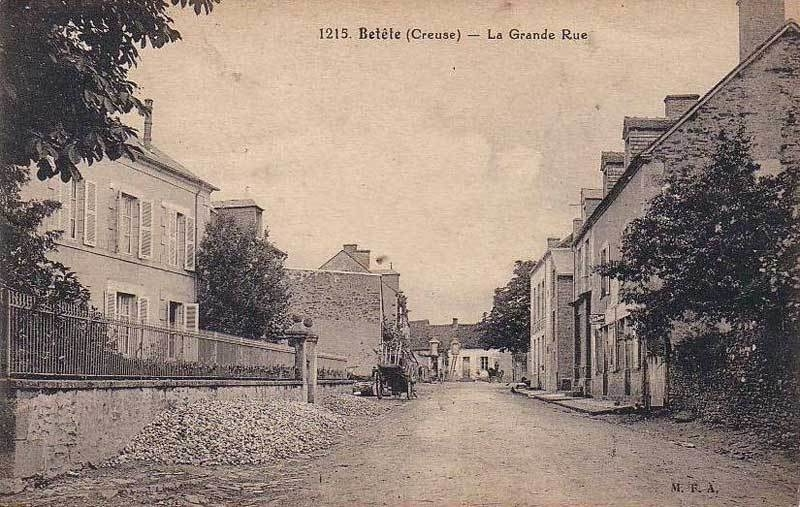 La Grande Rue